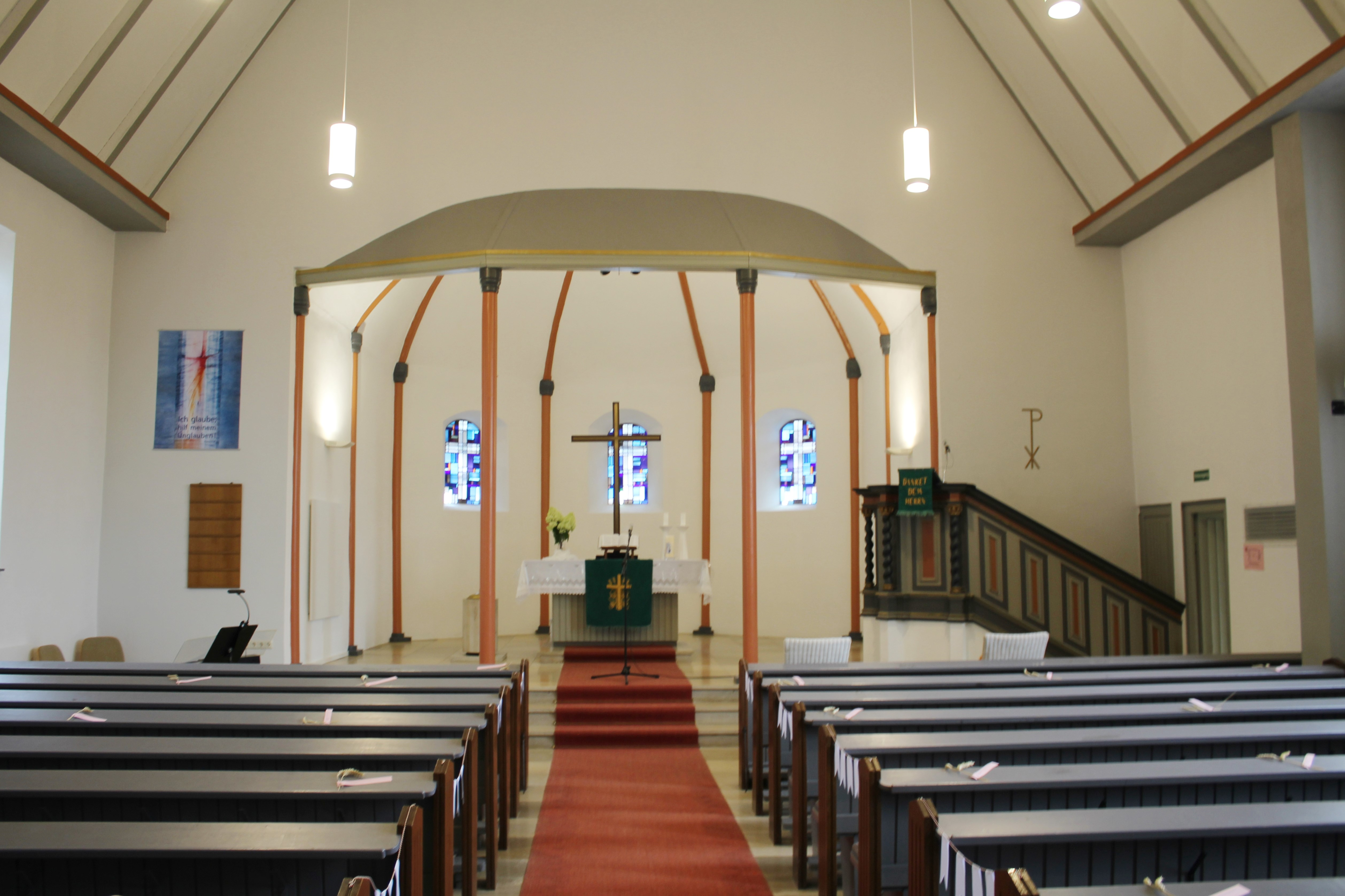 Evangelische Kirche Niederwetz, Gemeinde Schöffengrund, Hessen, Deutschland